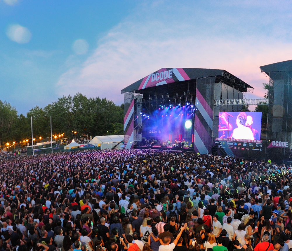 Dcode es un festival de música que se celebra el mes de septiembre en el Campus de la Facultad de Ciencias de la Información de la Universidad Complutense de Madrid (España).